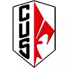 sport logo cus firenze